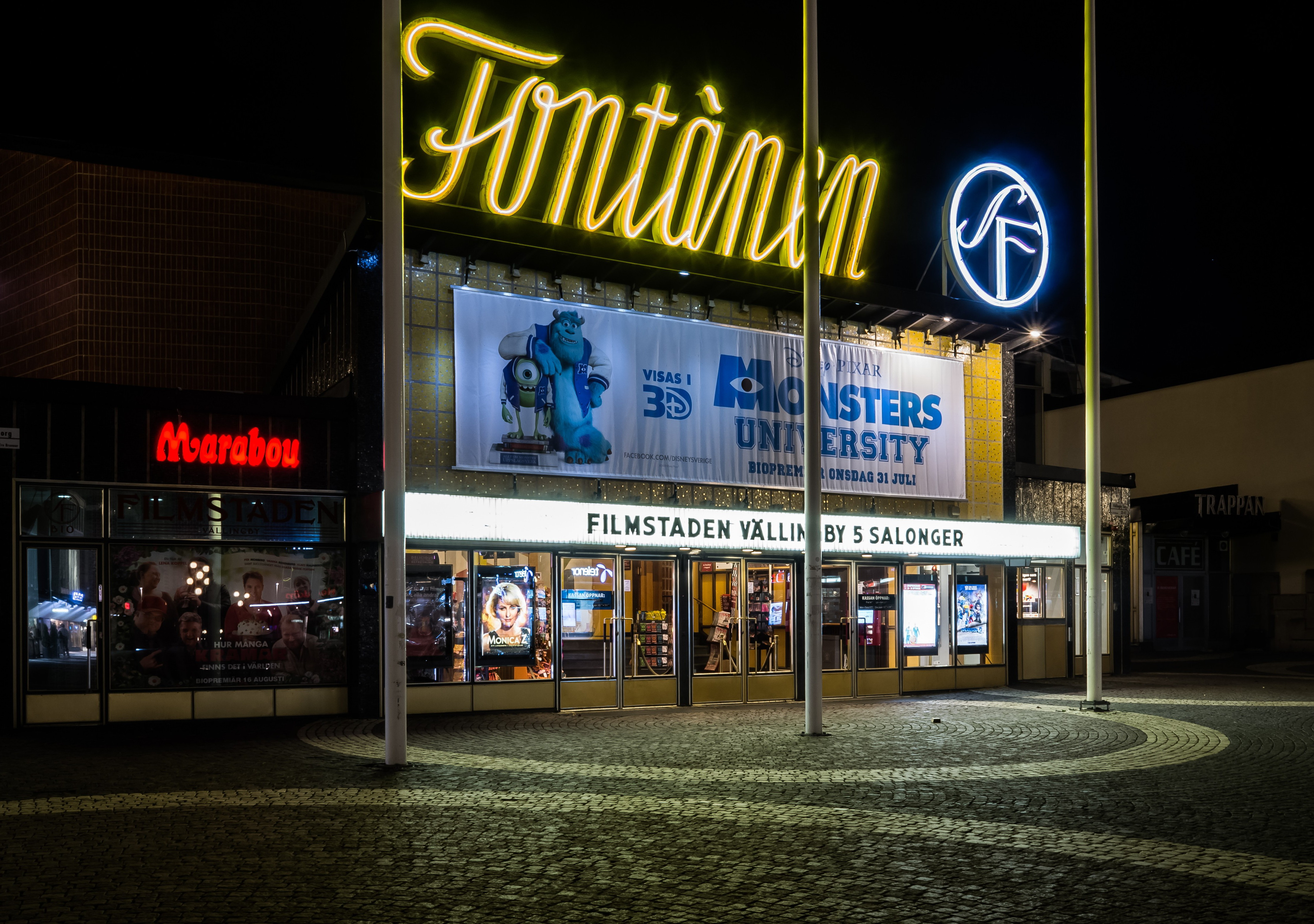 Bild på den klassiska biografen i Vällingby